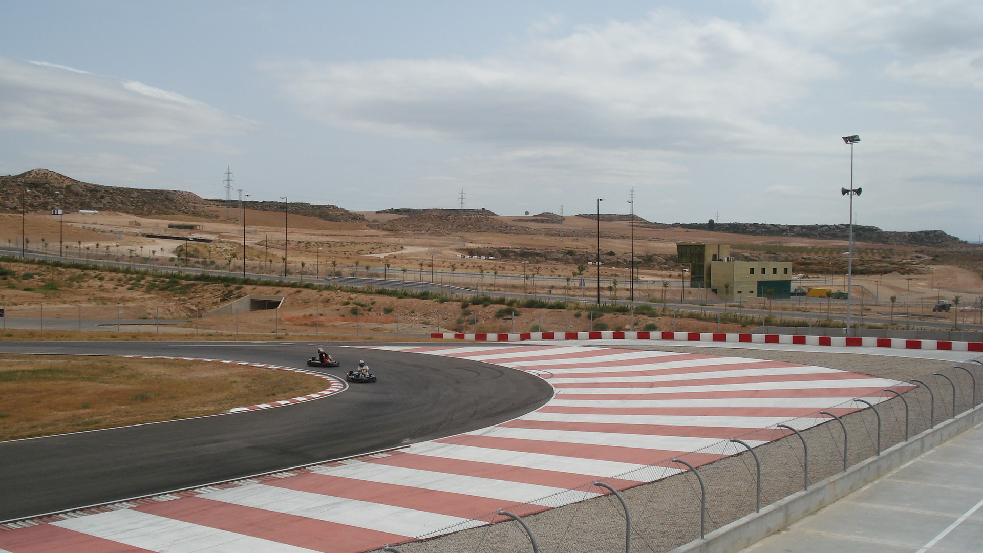 Aragonés: Zercuito de karting d'a Ziudat d'o motor d'AlcañizLA CIUDAD DEL MOTOR - ALCAÑIZ - ARAGÓN